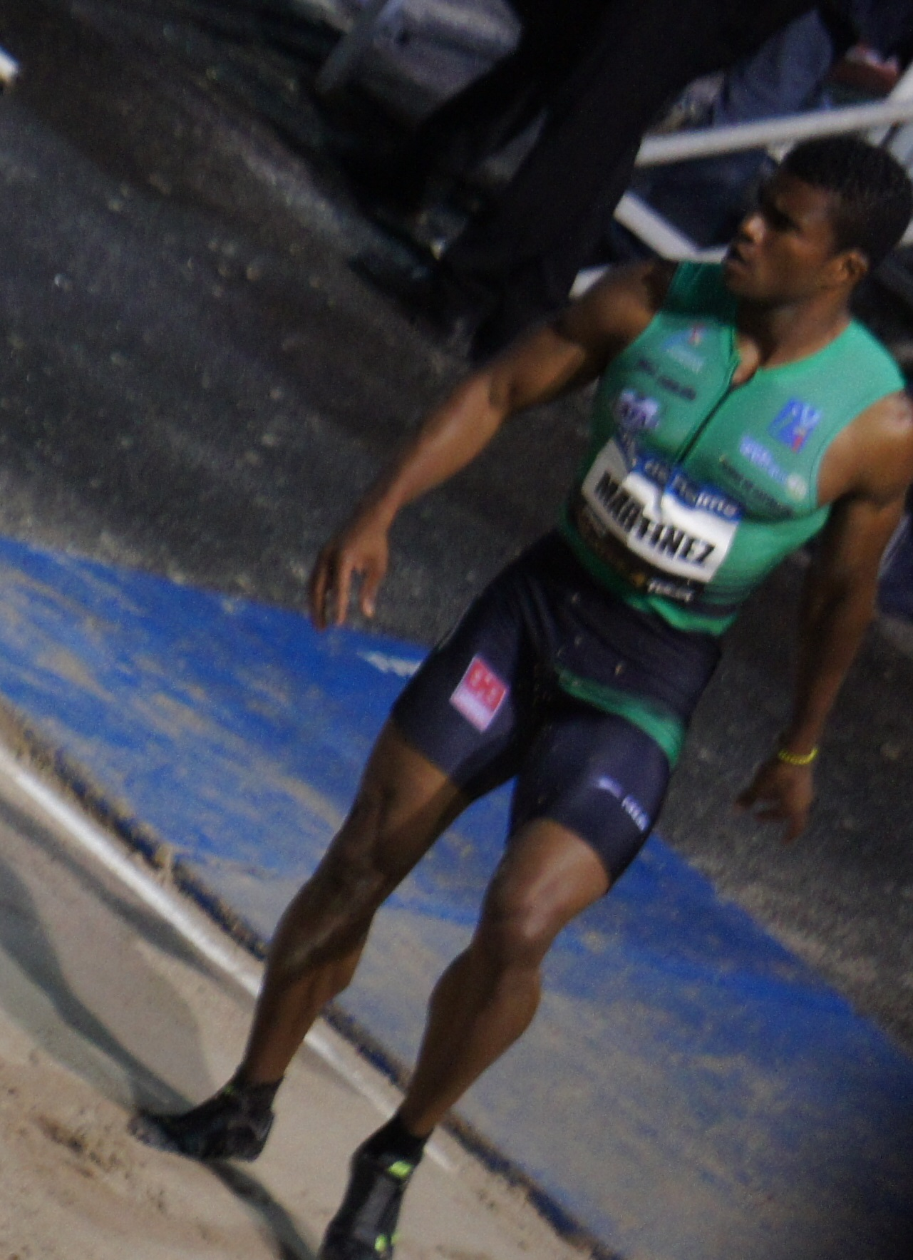 Wilfredo Martínez lors des Rencontres d'athlétisme de Reims 2013 - saut en longueur.